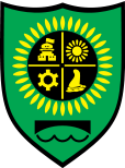 Грп општине Зрењанин